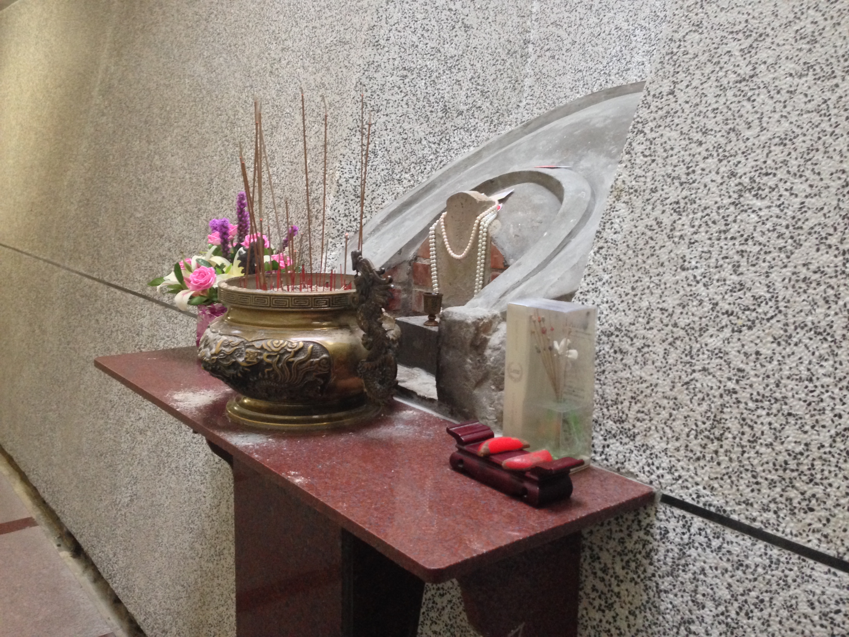 中文（台灣）: 石碇姑娘廟魏扁姑娘墓